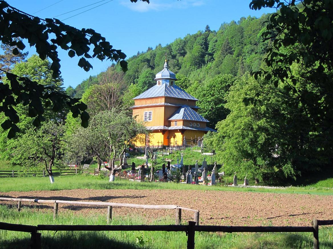 Дерев’яна церква Успення Пресвятої Богородиці, с. Майдан. Львівська обл. Дрогобицький р-н.